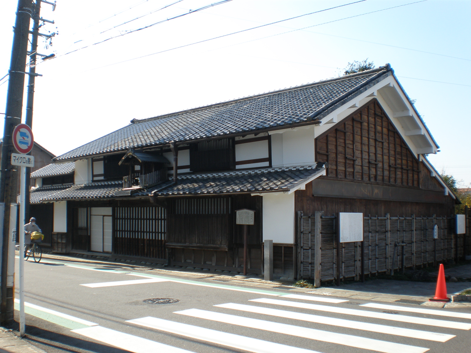 愛知県小牧市の旧家・岸田家の屋敷